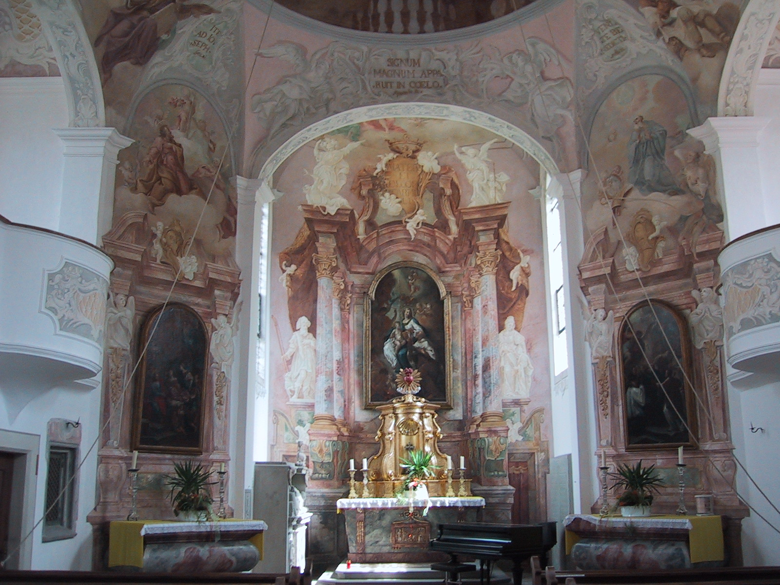 Schlosskapelle Mammern, Altar